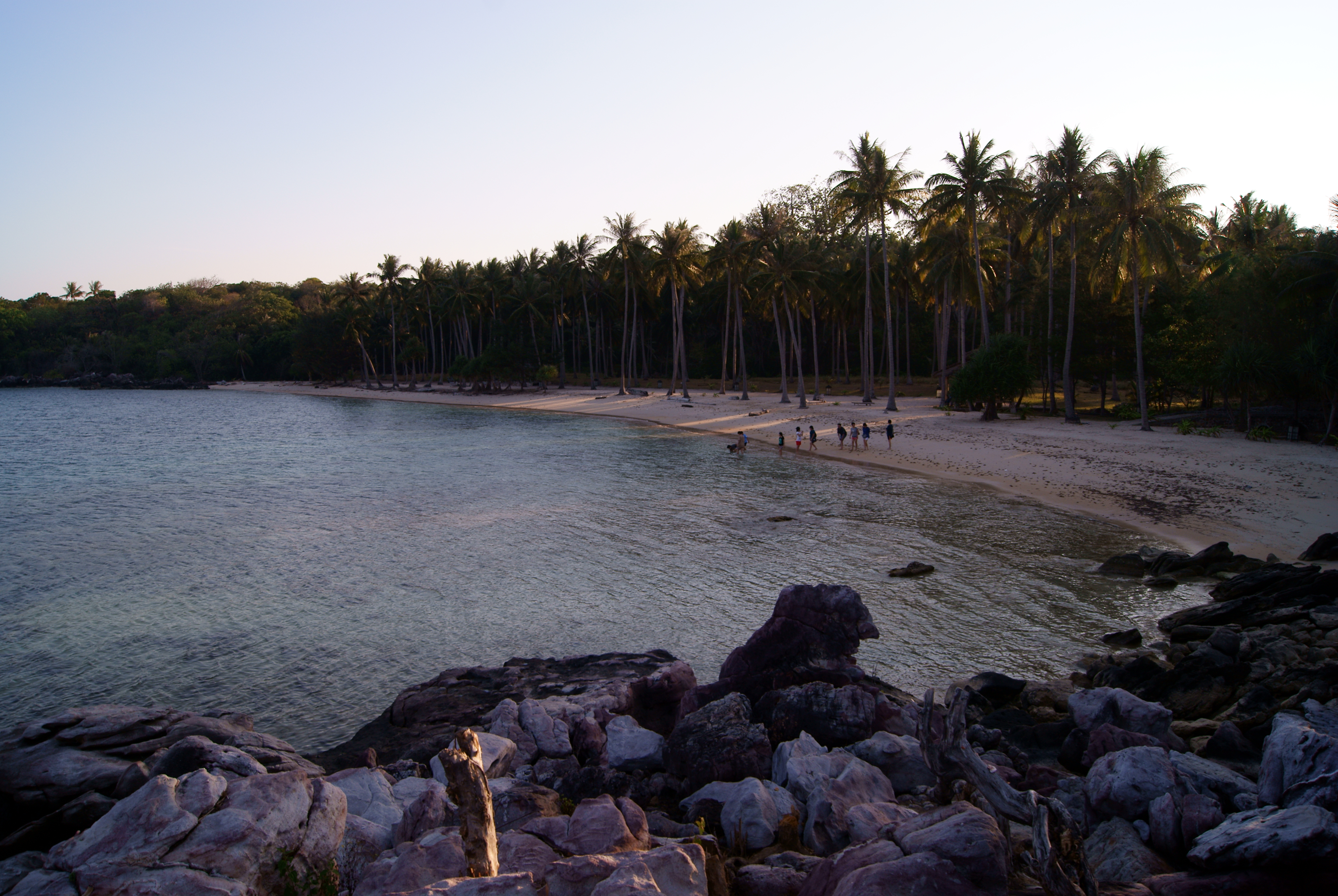 Nirwana Beach, Karimun Jawa